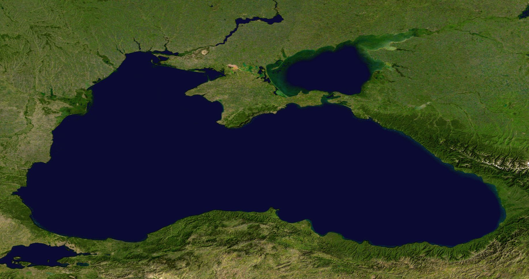 Schwarzes Meer, Ausschnitt aus Blue Marble